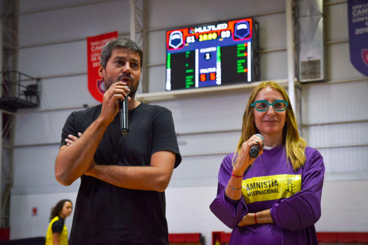 Amnistía Internacional y el Club Atlético de San Lorenzo de Almagro organizaron un partido mixto con la consigna «Me juego por la igualdad», con el fin de dejar un mensaje por la igualdad y la diversidad en el mundo del fútbol, y en particular por la profesionalización del fútbol femenino. Estuvieron presentes jugadoras y jugadores de fútbol, periodistas y actrices.